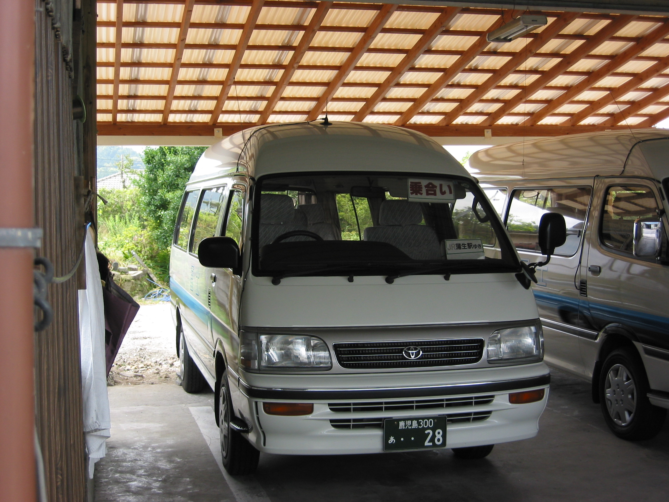 富士タクシー（鹿児島県） 蒲生町乗合タクシーの車両